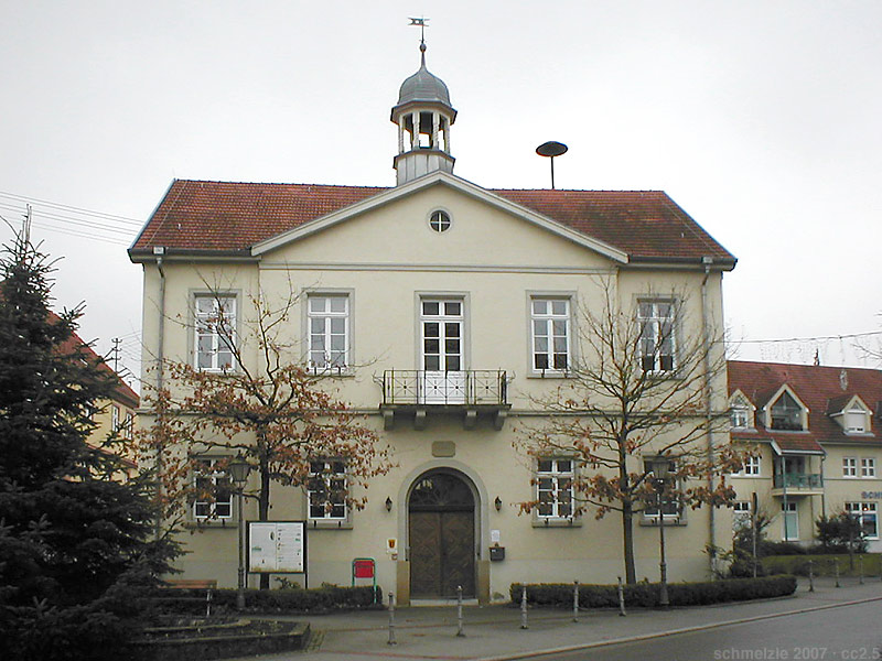 Altes Rathaus in Neckarbischofsheim